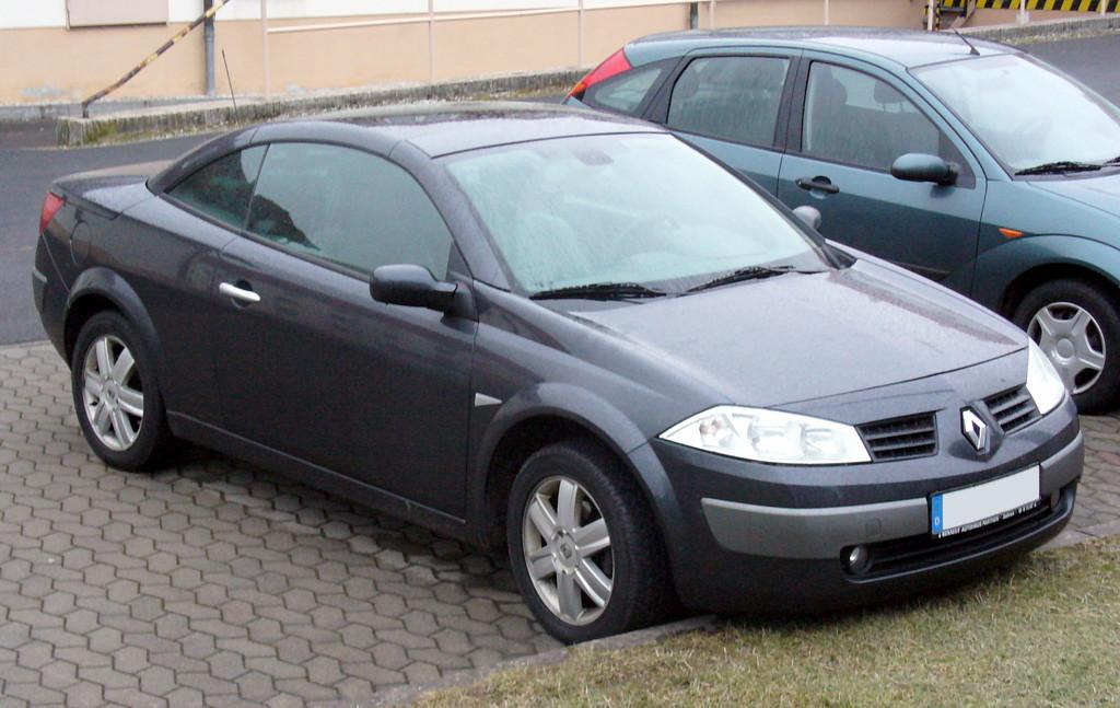 Renault Mégane II Phase I CC